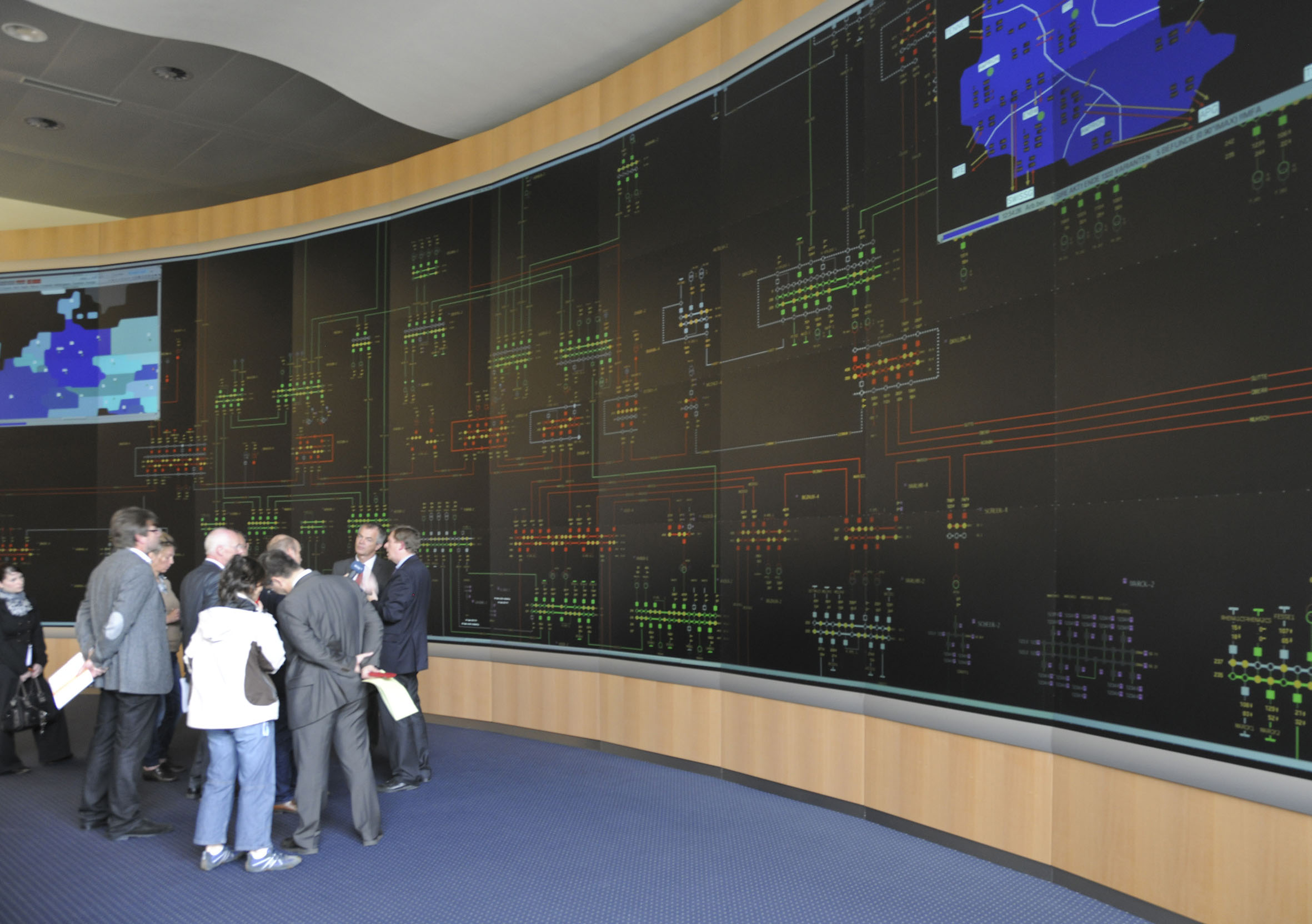 Amprion: Steuerung von Stromnetzen, elektronische Schautafel in der Leitstelle (Systemführung Netze) Klimaschutzminister Johannes Remmel (2. v.r.) informierte sich am 5. Oktober 2011 beim Netzbetreiber Amprion in Pulheim-Brauweiler über die Zukunft der Netze. „Wir wollen mehr Erneuerbare Energie und eine dezentrale Energieversorgung. Dafür brauchen wir sichere und intelligente Stromnetze. Unternehmen wie Amprion sind dabei im doppelten Sinne an der Schaltstelle zur Energiewende“, sagte Remmel. Die Netzsicherheitszentrale von Amprion ist die siebte Station seiner Klimaschutztour. Weitere Informationen unter : Flickr tags: Klimaschutztour; 2011; NRW; EANRW; Klimaschutz; EnergieAgenturNRW; Amprion GmbH; Energiewende; Stromnetze; Pulheim-Brauweiler